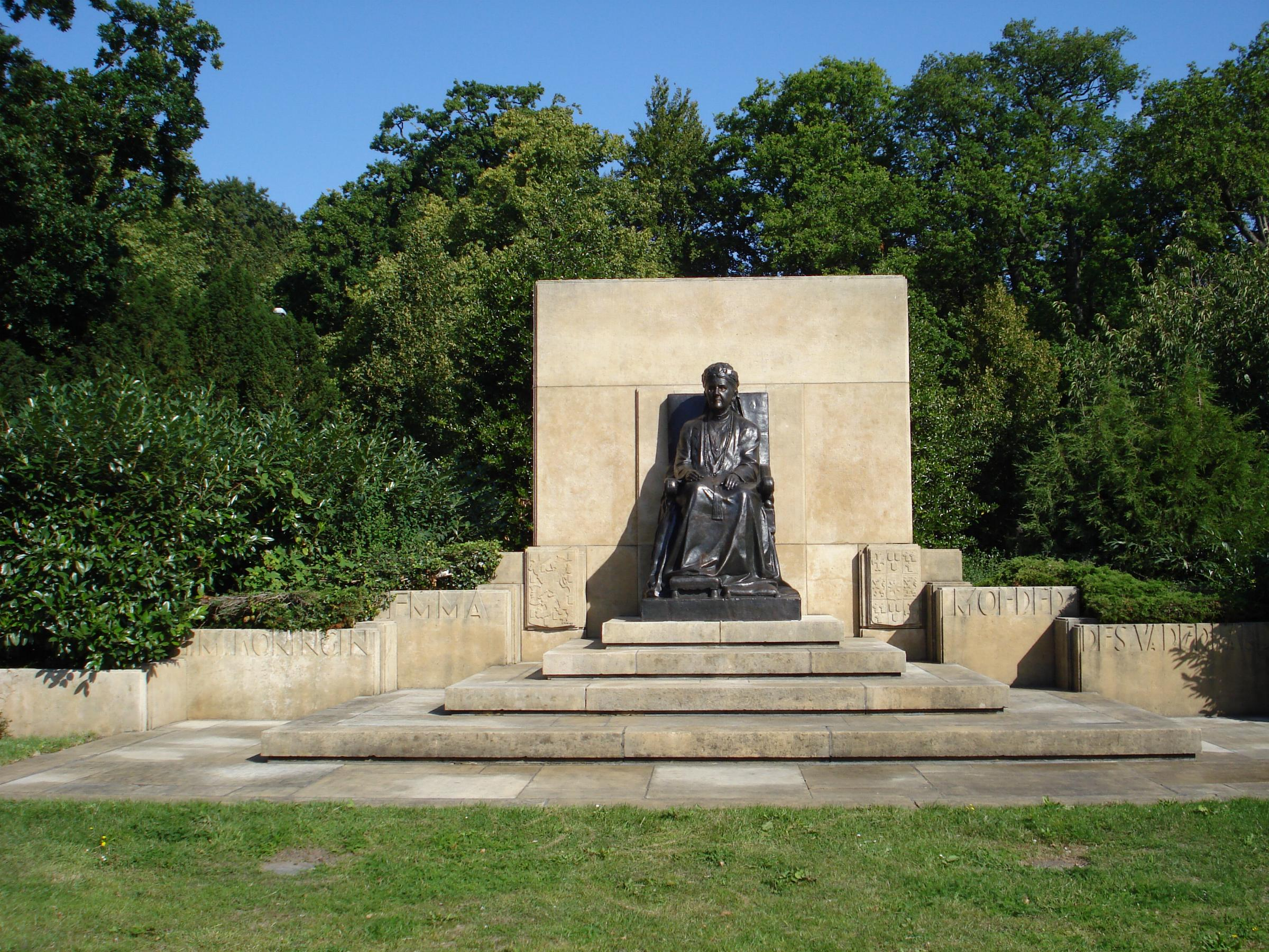 Den Haag, Josef Israëlsplein. Monument koningin-moeder Emma van Toon Dupuis en Co Brandes. The Hague/The Netherlands. Bronzen gereconstrueerd afgietsel door Ton Mooy van het oorspronkelijke beeldhouwwerk door Toon Dupuis